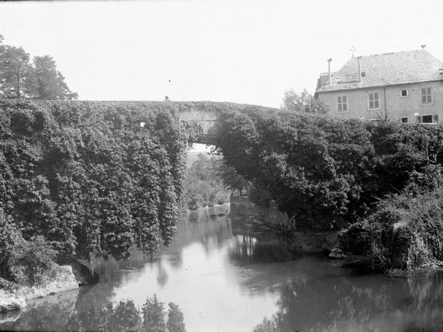 Fonds Trutat - Photographie ancienne Cote : TRU C 594 Localisation : Fonds ancien (S 30) Original non communicable Titre : Pont de lierre, Bétharram Auteur : Trutat, Eugène Rôle de l’auteur : Photographe Lieu de création : Lestelle-Bétharram (Pyrénées-Atlantiques) Date de création : 1859-1910 [entre] Mesures : : 9 x 12 cm Mot(s)-clé(s) : -- Pont -- Rivière -- Végétation -- Pierre -- Lierre -- Maison -- Arche -- Rocher -- Lestelle-Bétharram (Pyrénées-Atlantiques) -- Nay-Bourdettes-est (Pyrénées-Atlantiques ; canton) -- Aquitaine (France) -- 19e siècle, 2e moitié -- 20e siècle, 1e quart Médium : Photographies -- Positifs sur plaque de verre -- Noir et blanc -- Paysages Bibliothèque de Toulouse. Domaine public